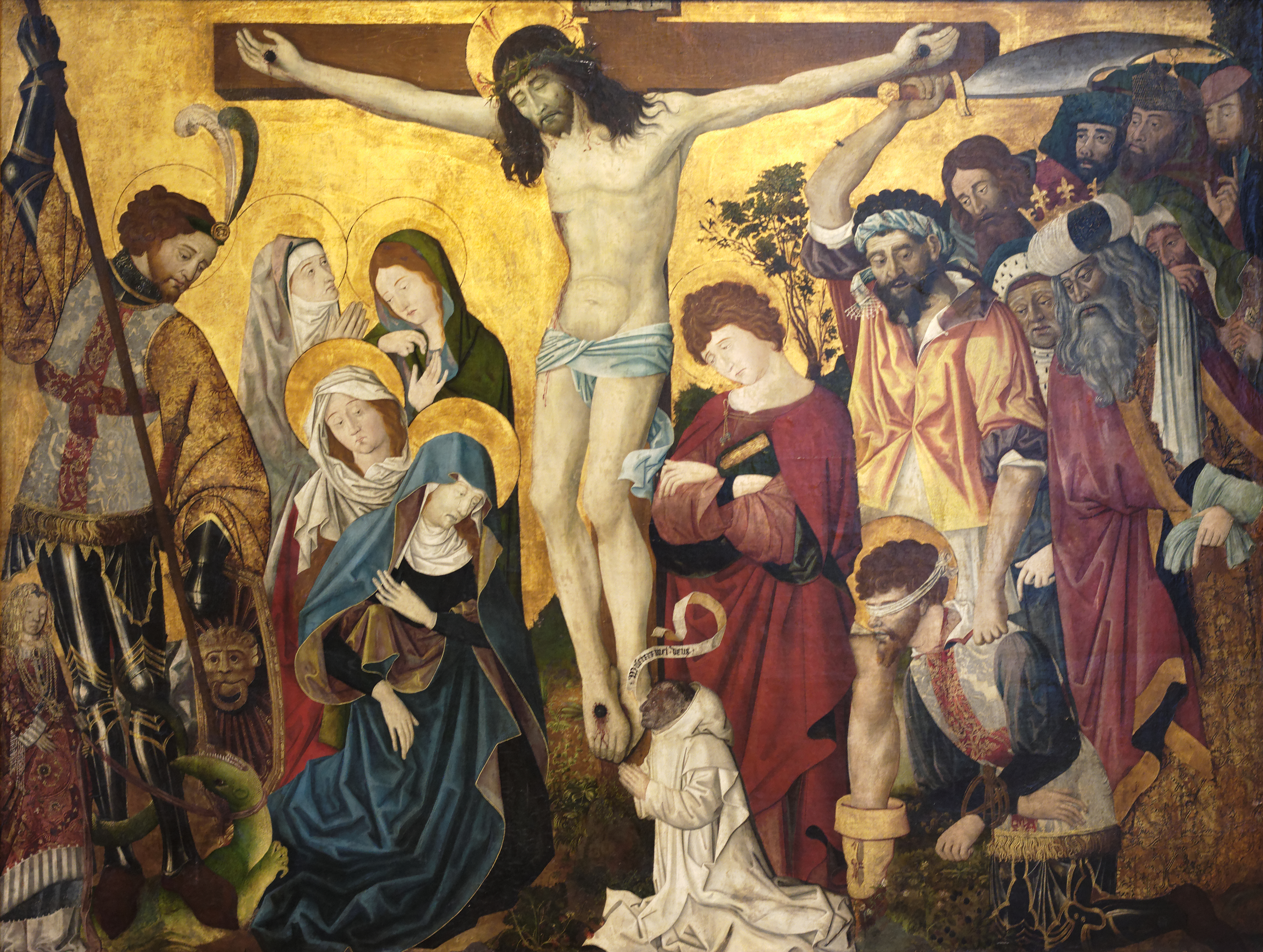 Ce retable a été peint pour être, à la chartreuse de Champmol, associé au Retable de saint Denis (Paris, musée du Louvre) sur les autels du choeurs des frères convers. Il en reprend les dimensions, le fond d'or et la composition, mais dans le style du milieu du XVe siècle. Le chartreux en prière au pied de la croix, qui n'a pas été identifié, est probablement le donateur.